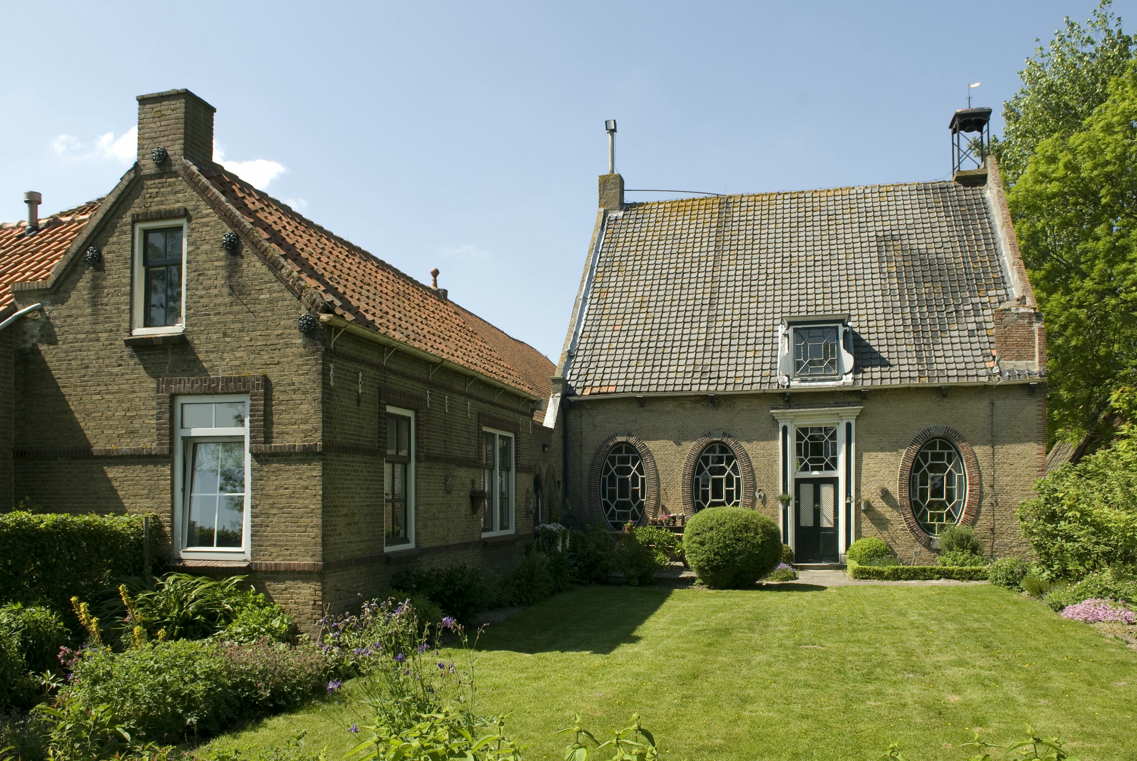 Reijgersburgh: Overzicht van de voorgevel, met gazon (opmerking: Project RRWR)